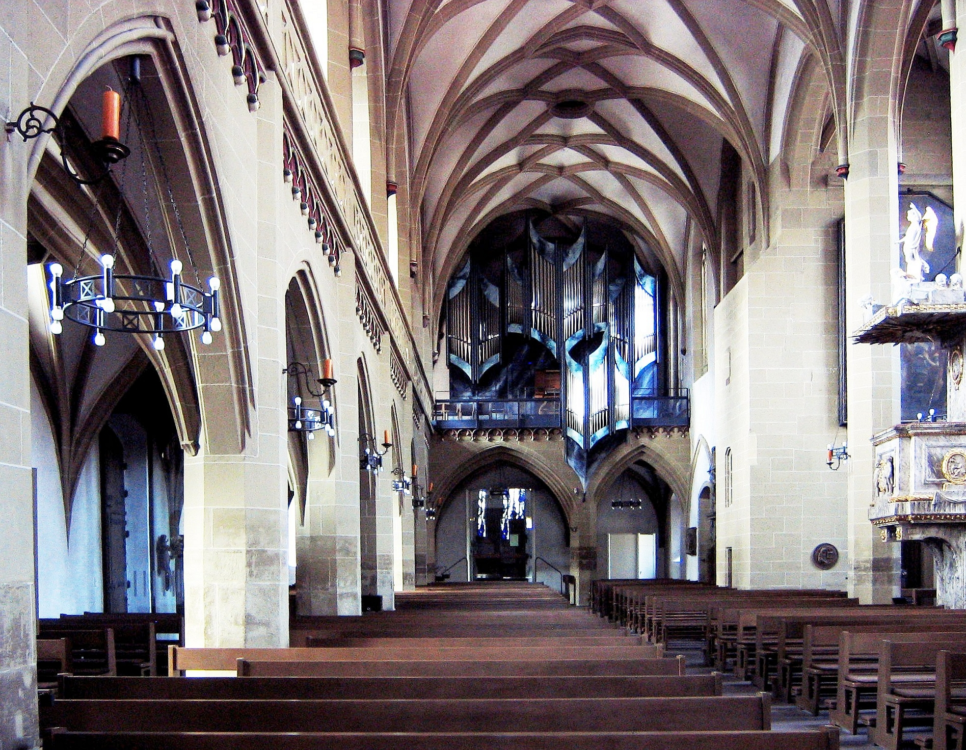 Innenansicht der St.Johanneskirche in Kitzingen